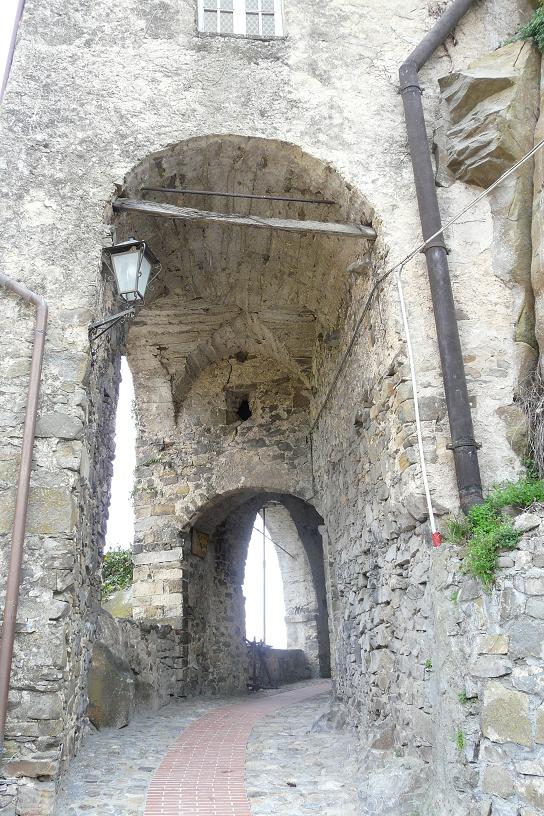 Porta della Pena, Ceriana, Liguria, Italia